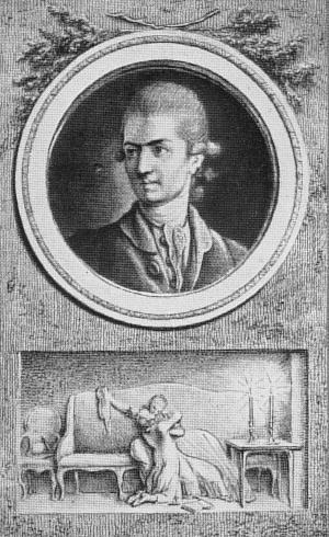 Originalzeichnung von Daniel Chodowiecki zu seinen Stichen für Christian Friedrich Himburgs (* 1733; † 1801) unrechtmässige Ausgabe von Goethes Schriften 1775.